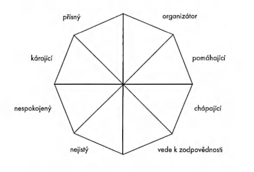 Model učitelova interpersonálniho chování v interakci se žáky